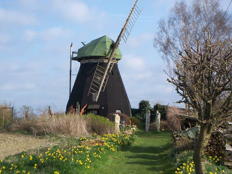 Erdholländer In Jammersdorf